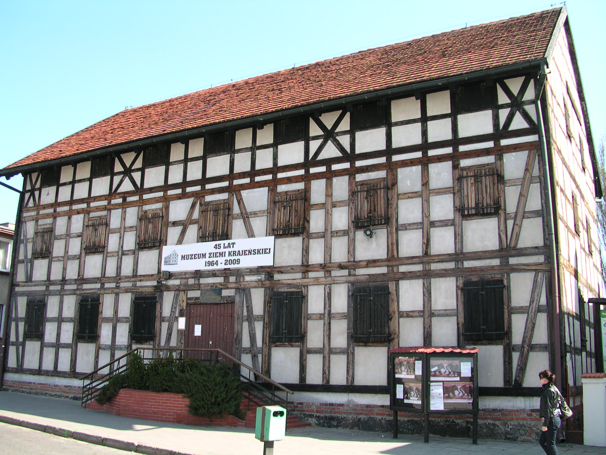 Nakło nad Notecią - Muzeum Ziemi Krajeńskiej (zabytek nr rejestr. A/974)